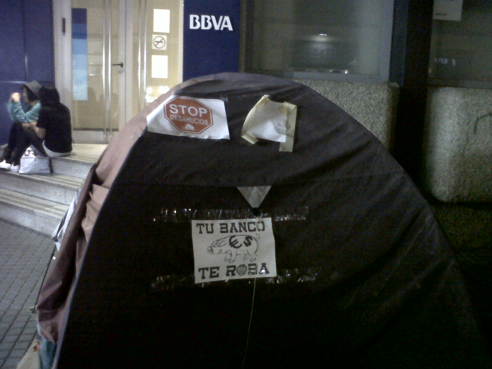 Plataforma frente al BBVA en Santa Cruz de Tenerife, en la Calle Castillo, para paralizar los desahucios.